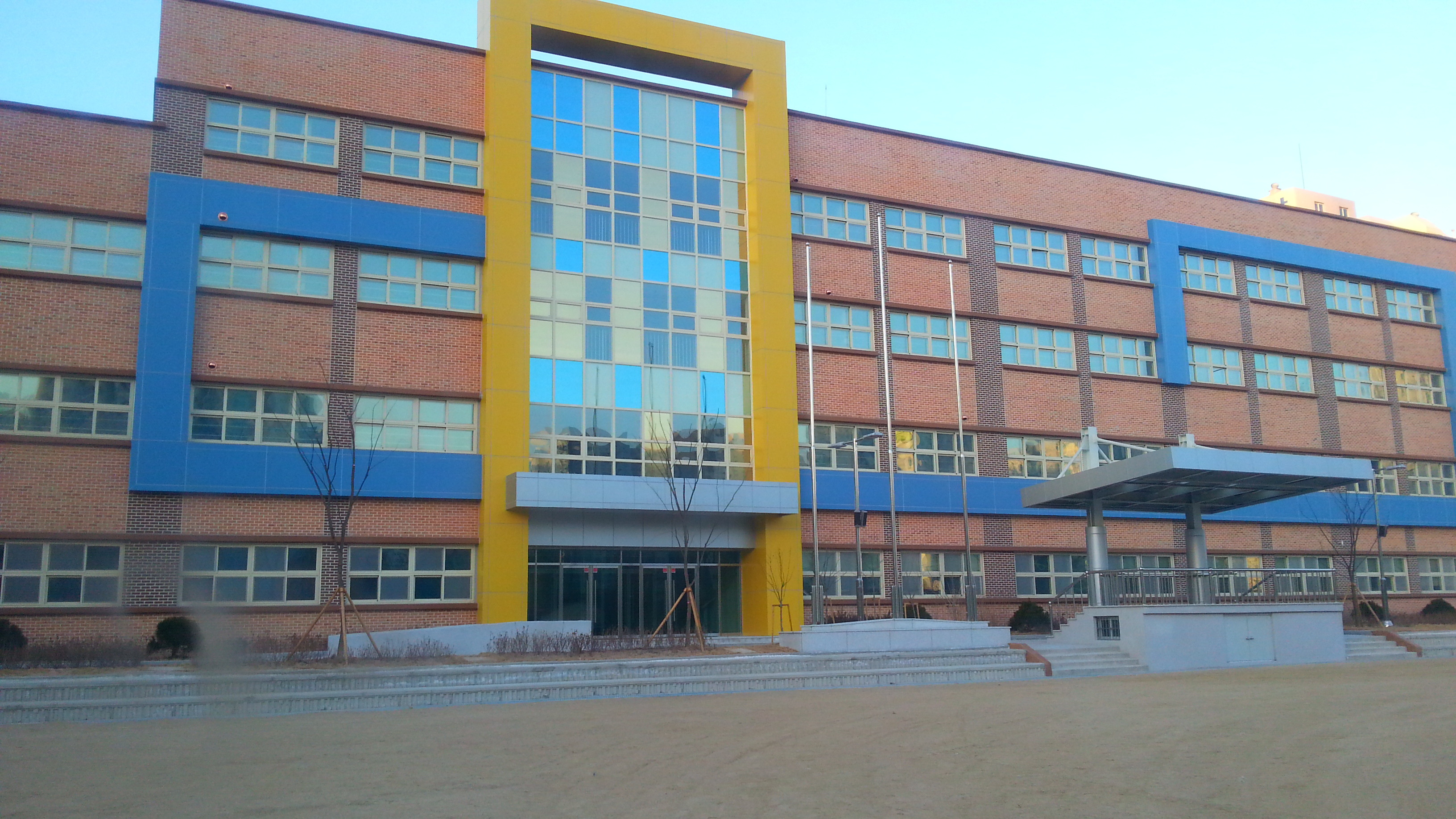 마곡중학교 모습*촬영자 이재민